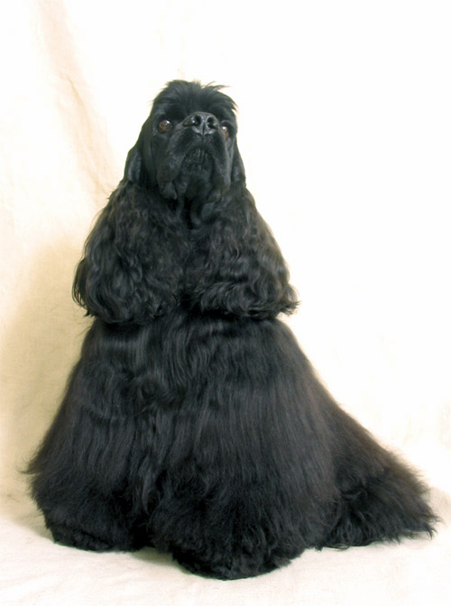 Cocker américain noir